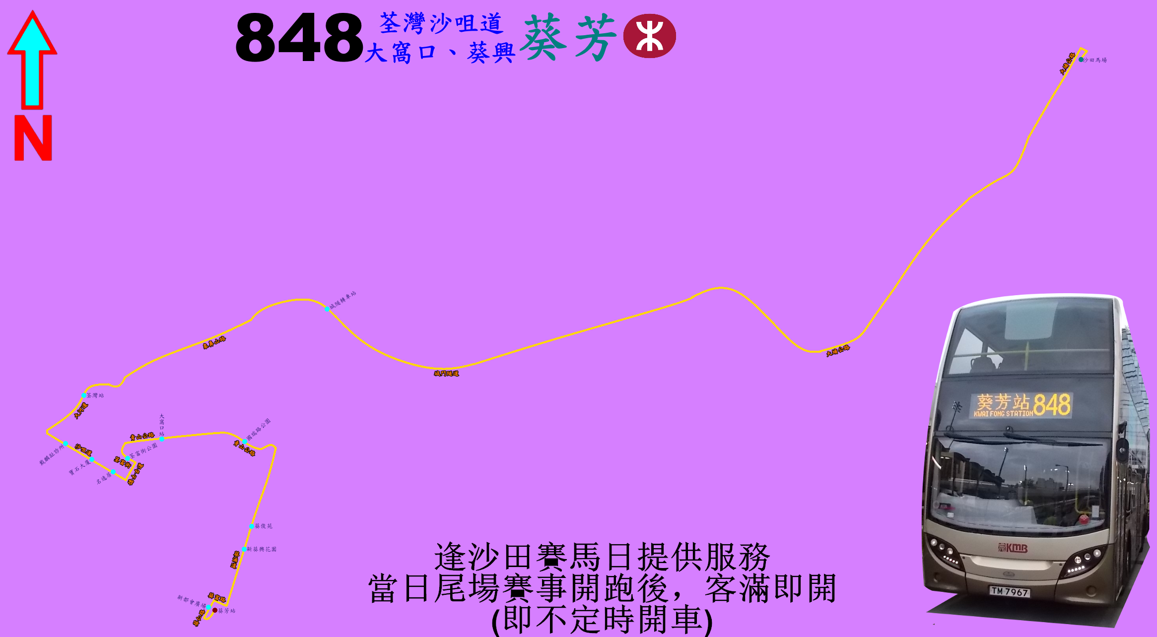 中文（香港）: 馬場巴士848線的走線圖